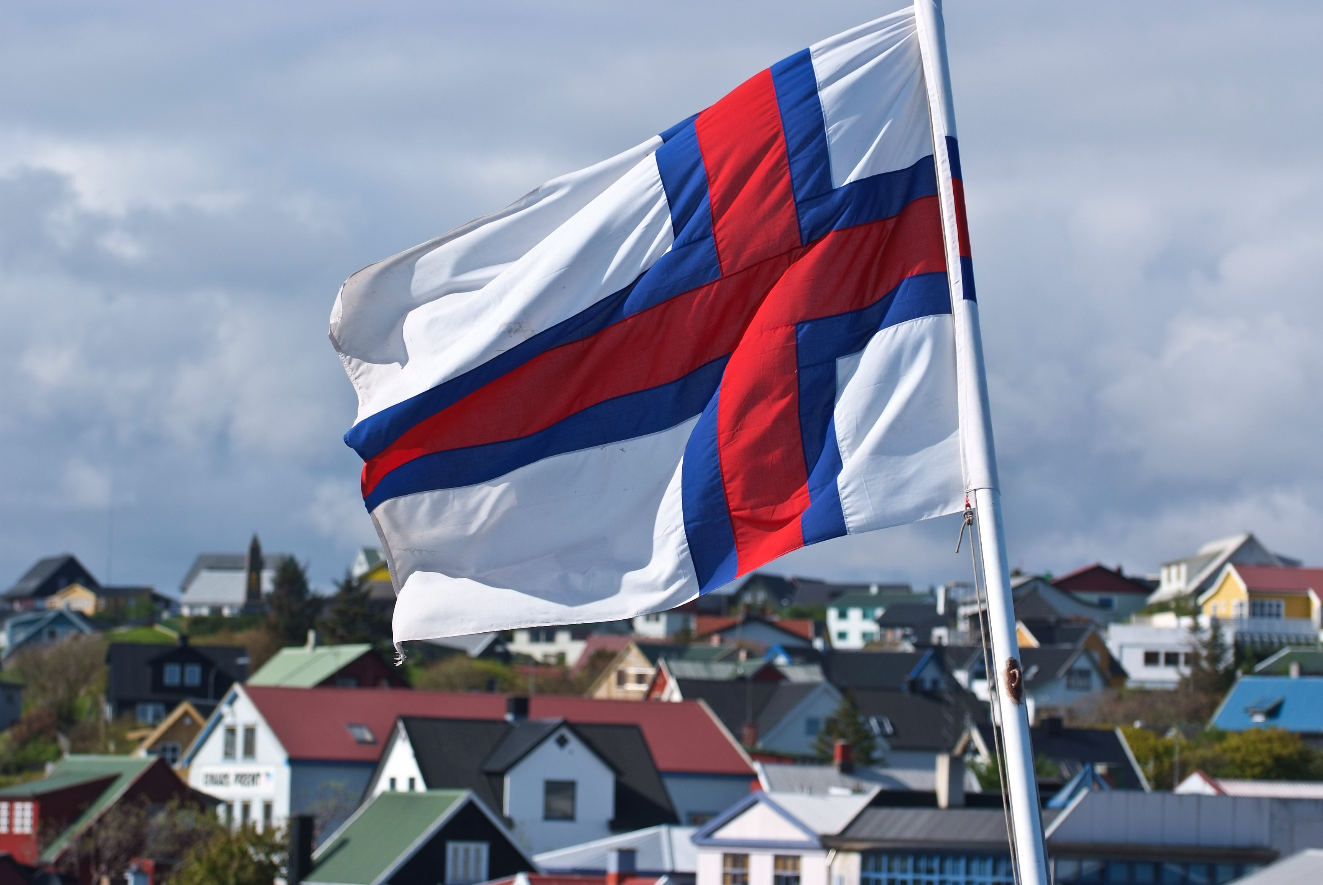 Merki�